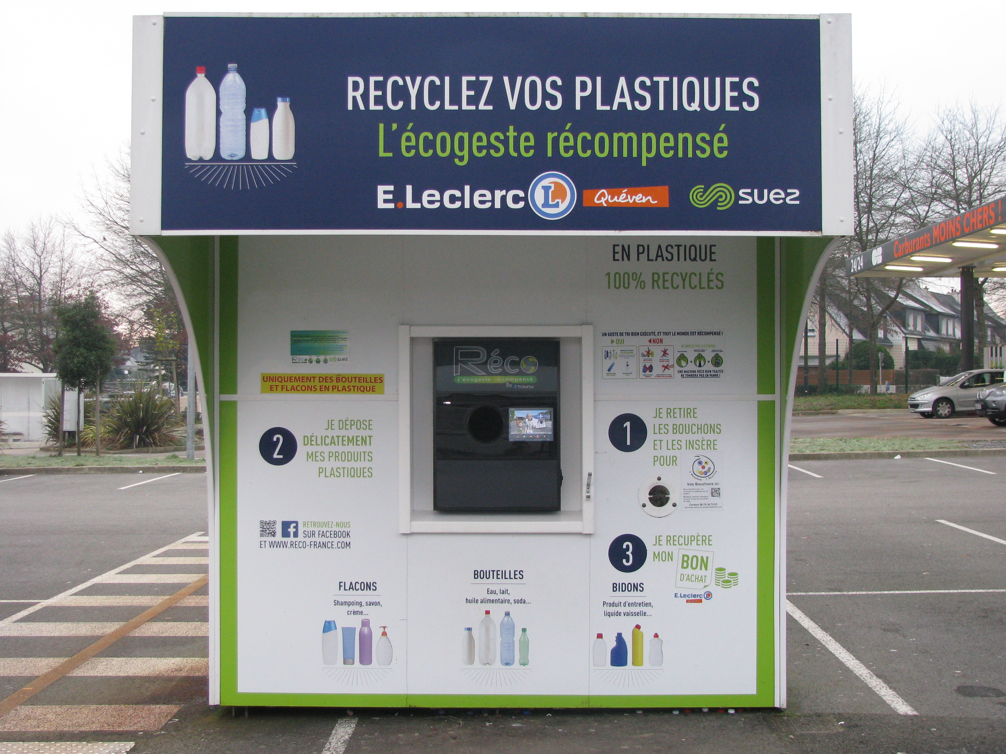 Le kiosque Réco pour recycler vos bouteilles en plastique. Situé à Quéven en Bretagne.